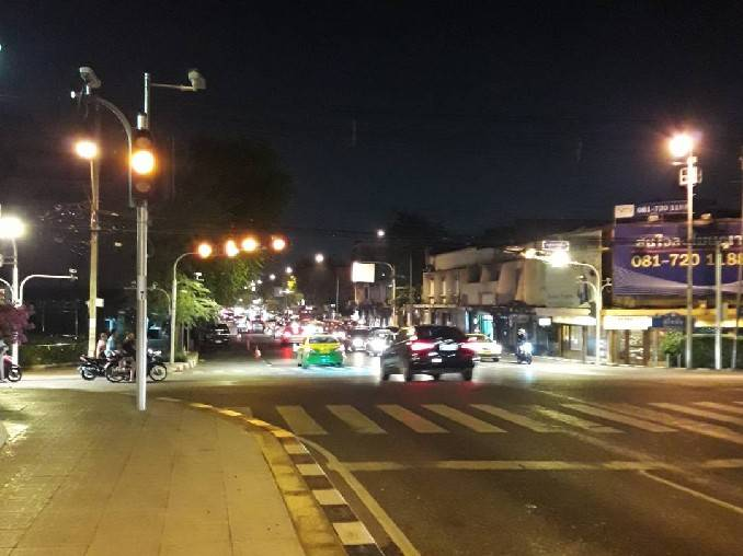 แยกสุโขทัย ยามค่ำคืนในปี พ.ศ. 2561